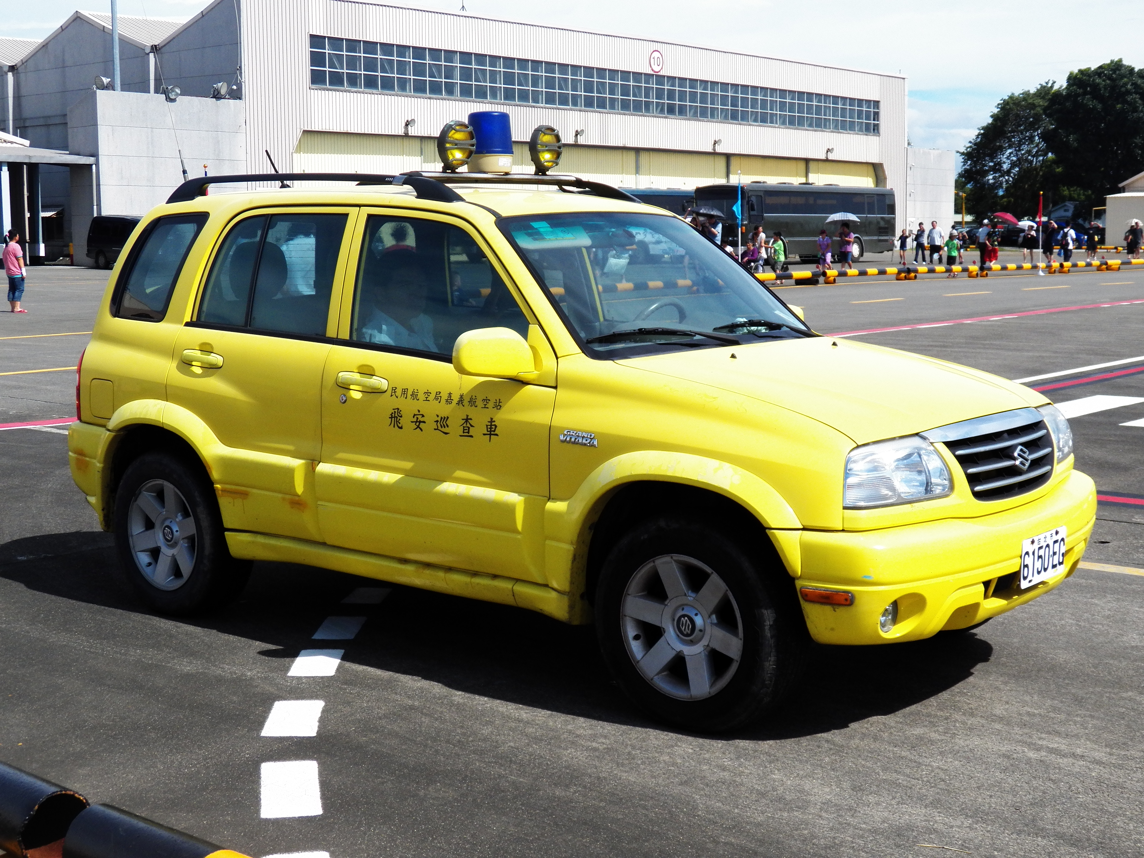 交通部民用航空局嘉義航空站的Suzuki Grand Vitara飛安巡查車6150-EG。